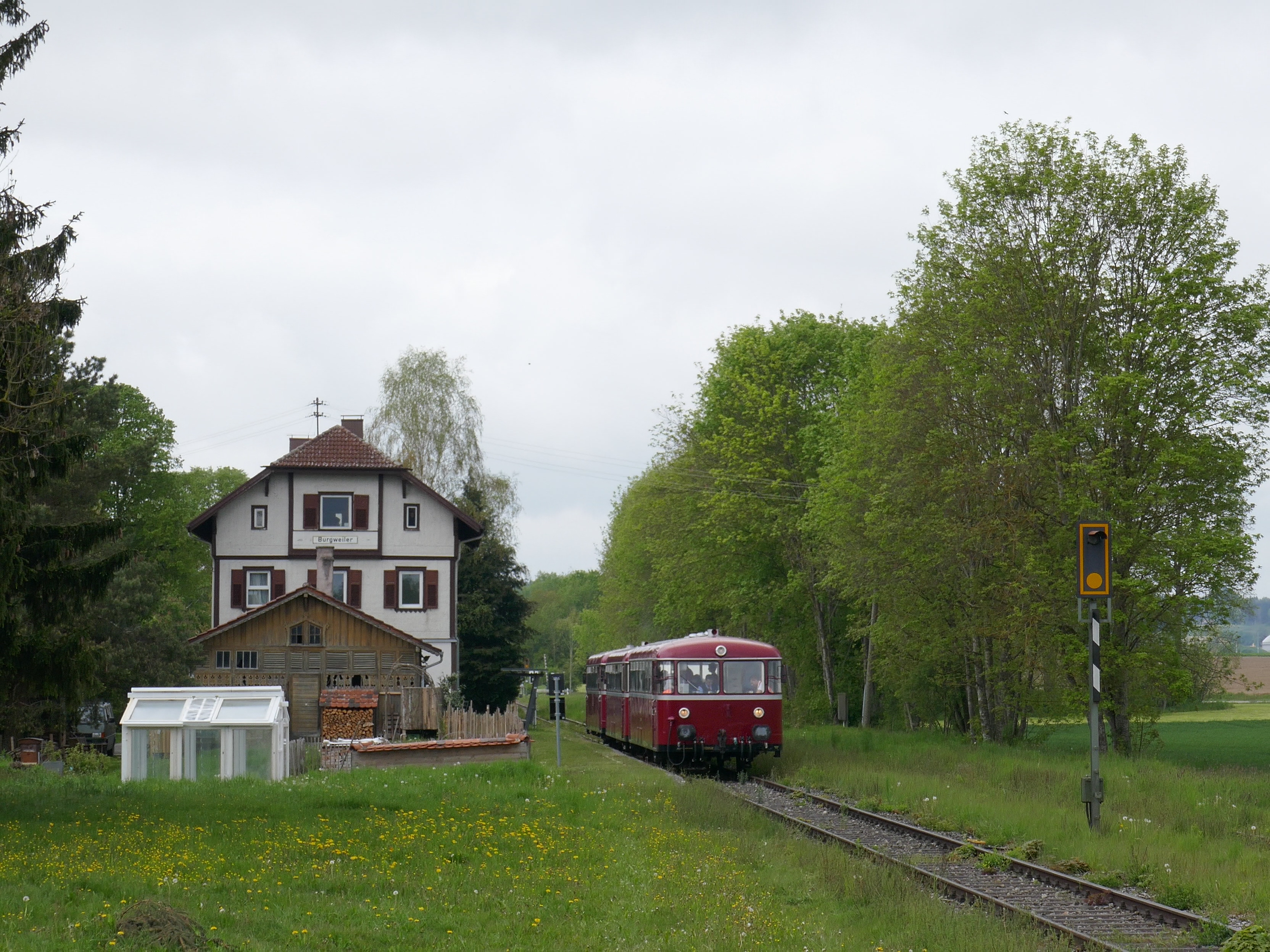 Historisches Bahnhofsgebäude und Güterschuppen in Burgweiler an der Bahnstrecke Altshausen - Pfullendorf